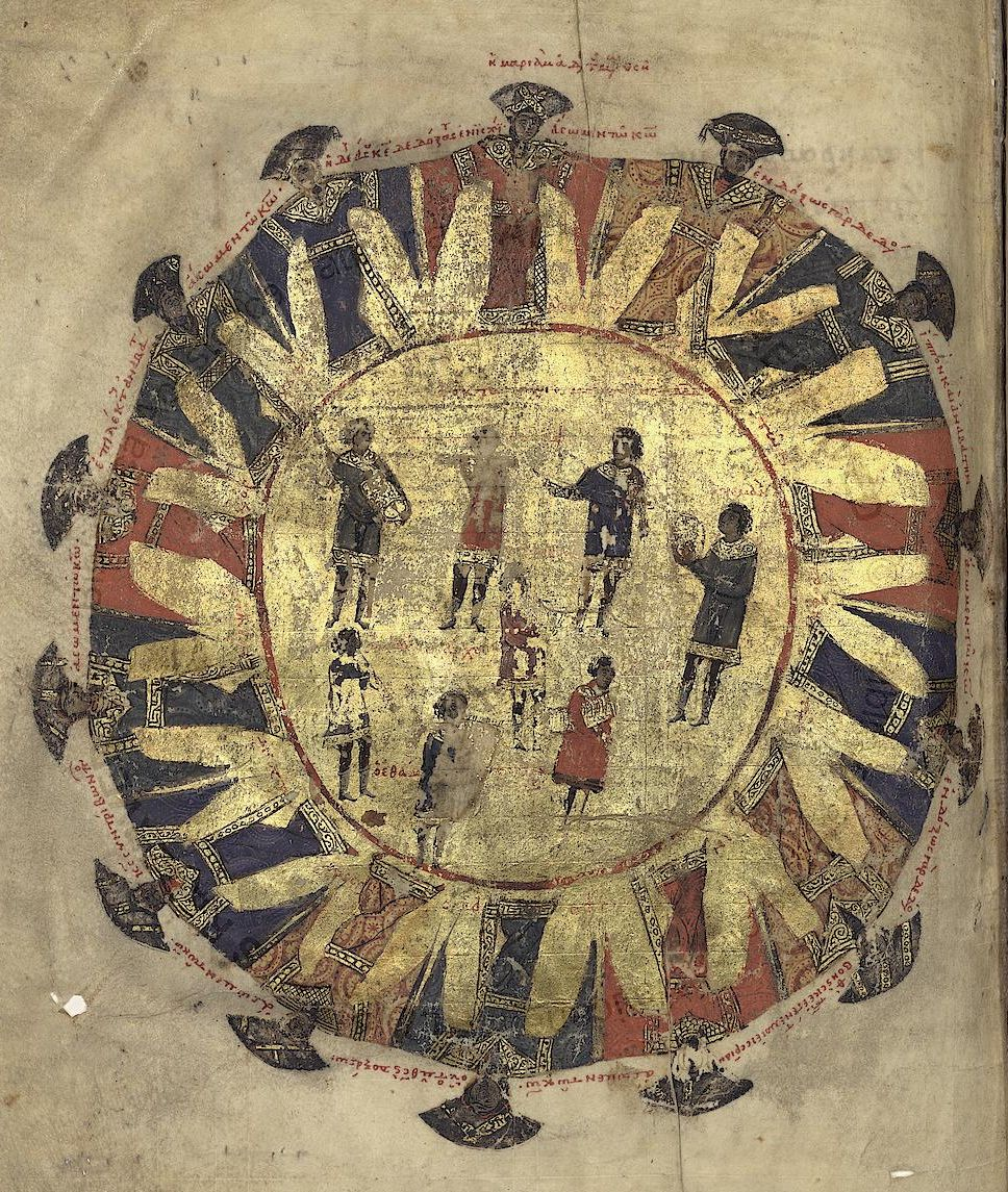 Танцующие женщины, миниатюра из рукописи vat gr 752 449v